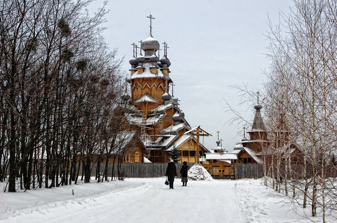 январь 2011 скит